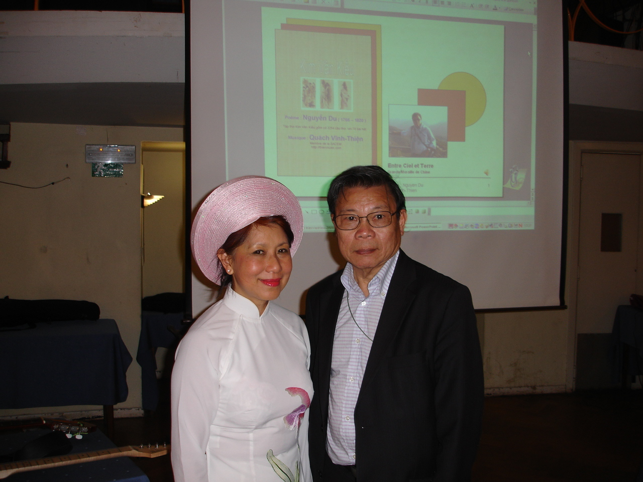 Quách Vĩnh Thiện và hiền thê tại Bruxelles ngày 26/03/2011